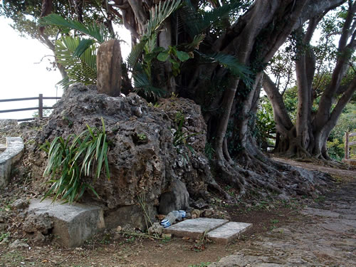 東姓拝所の石碑